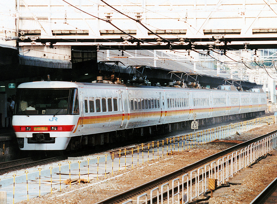 JR西日本 381系特急形電車 特急「スーパーくろしお」 クロ380